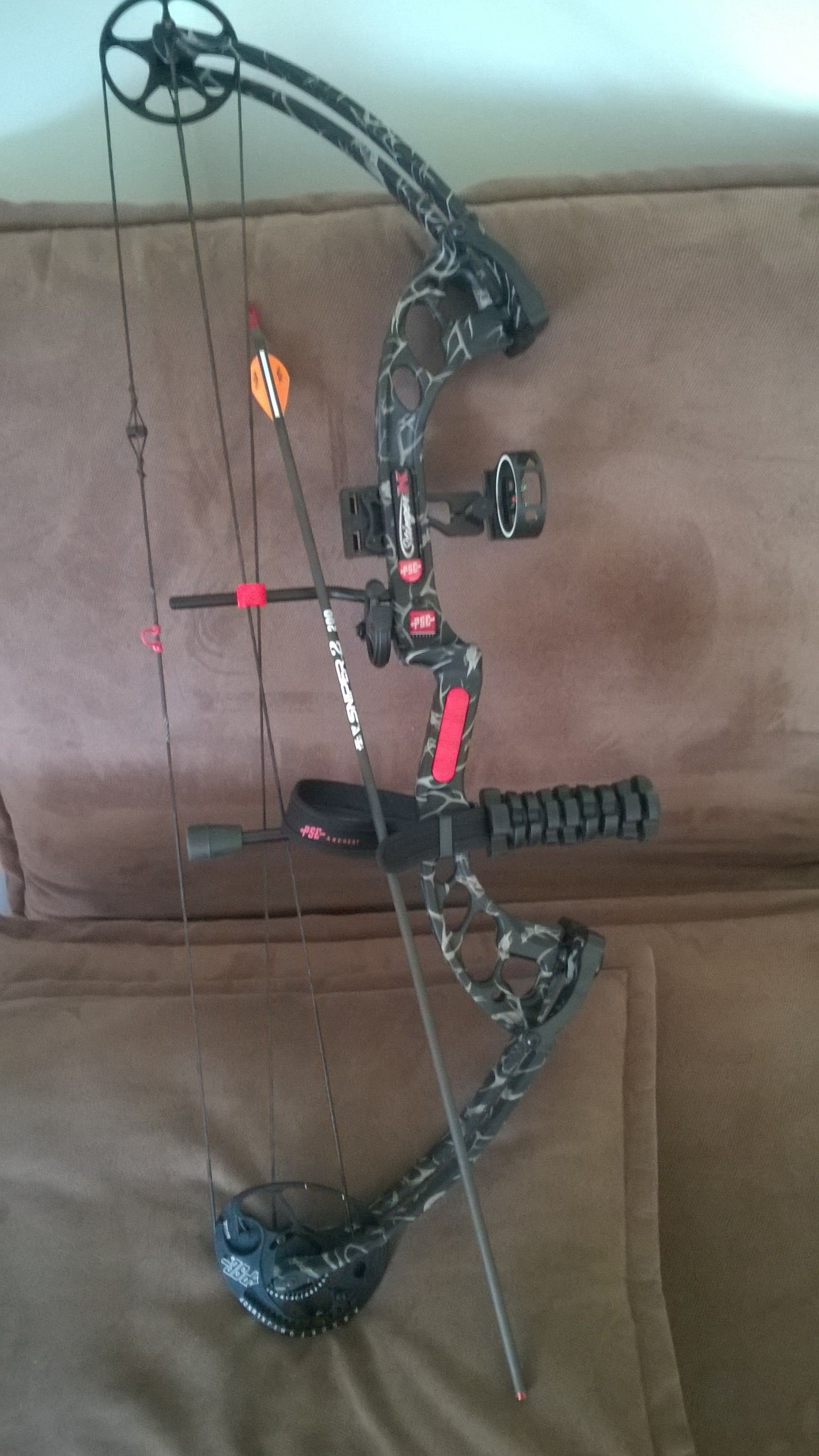 Talja jousi PSE Archery